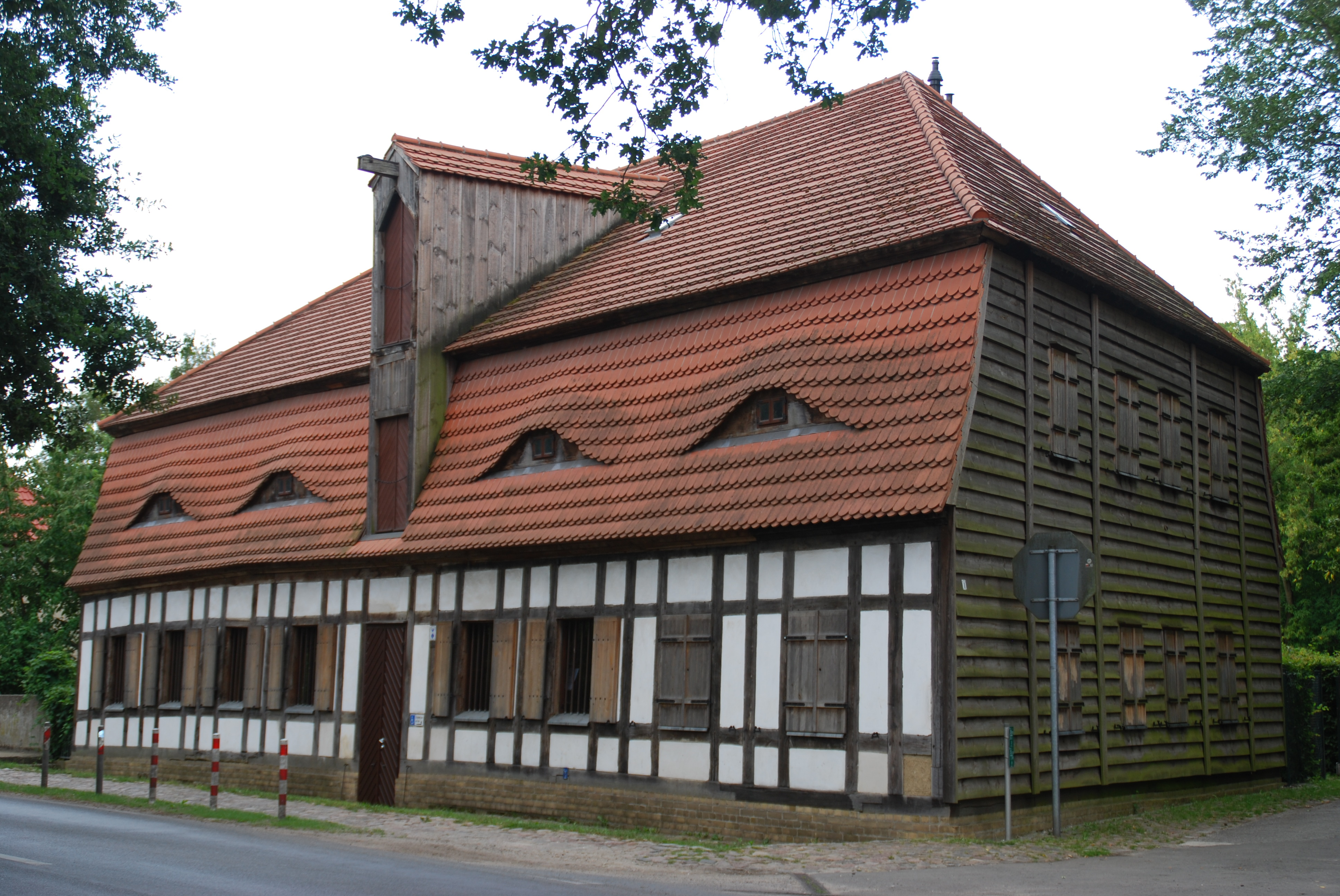 Rauhfutterspeicher Schöneiche